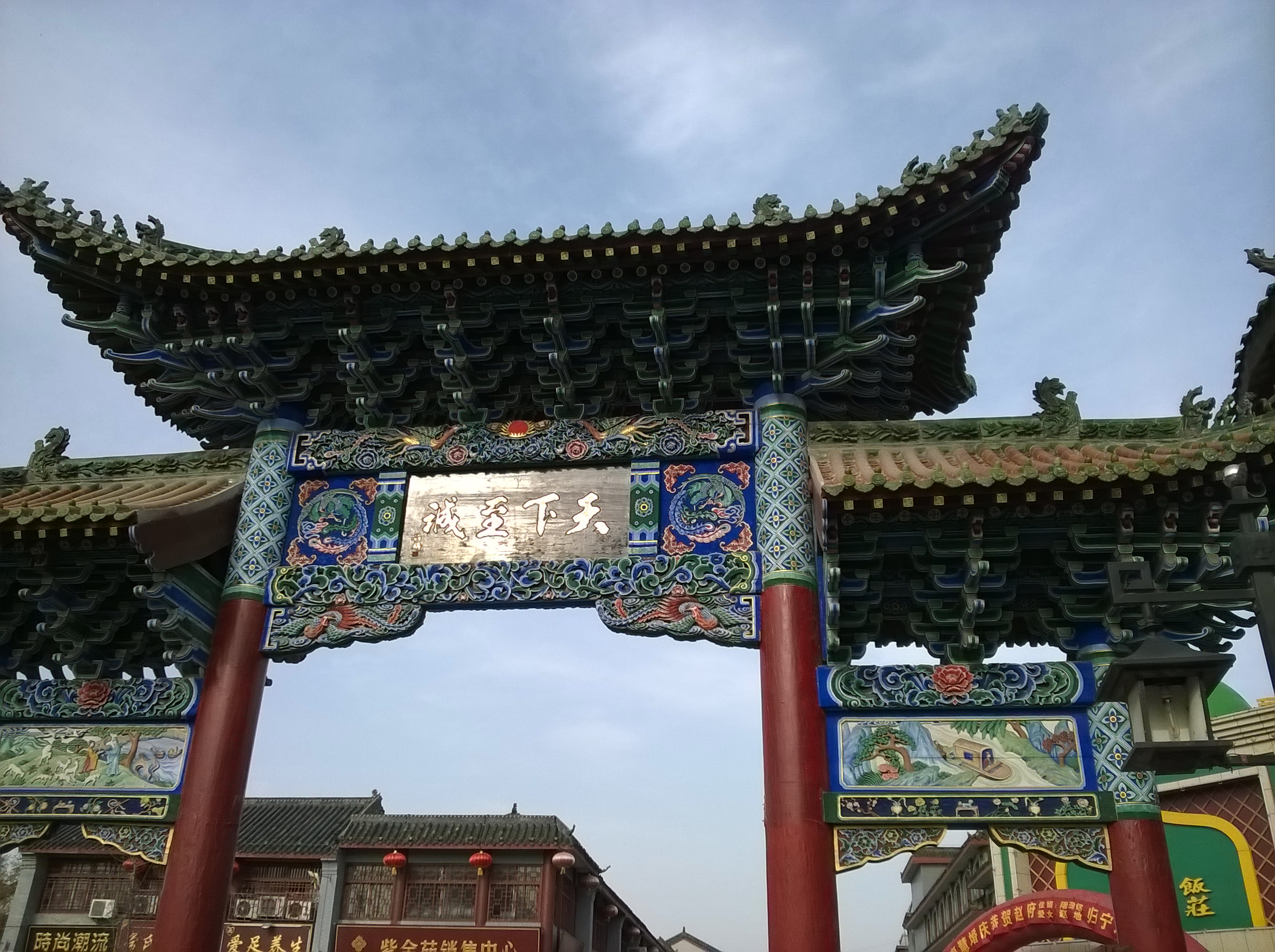 中文（中国大陆）: 社旗县的一座牌坊